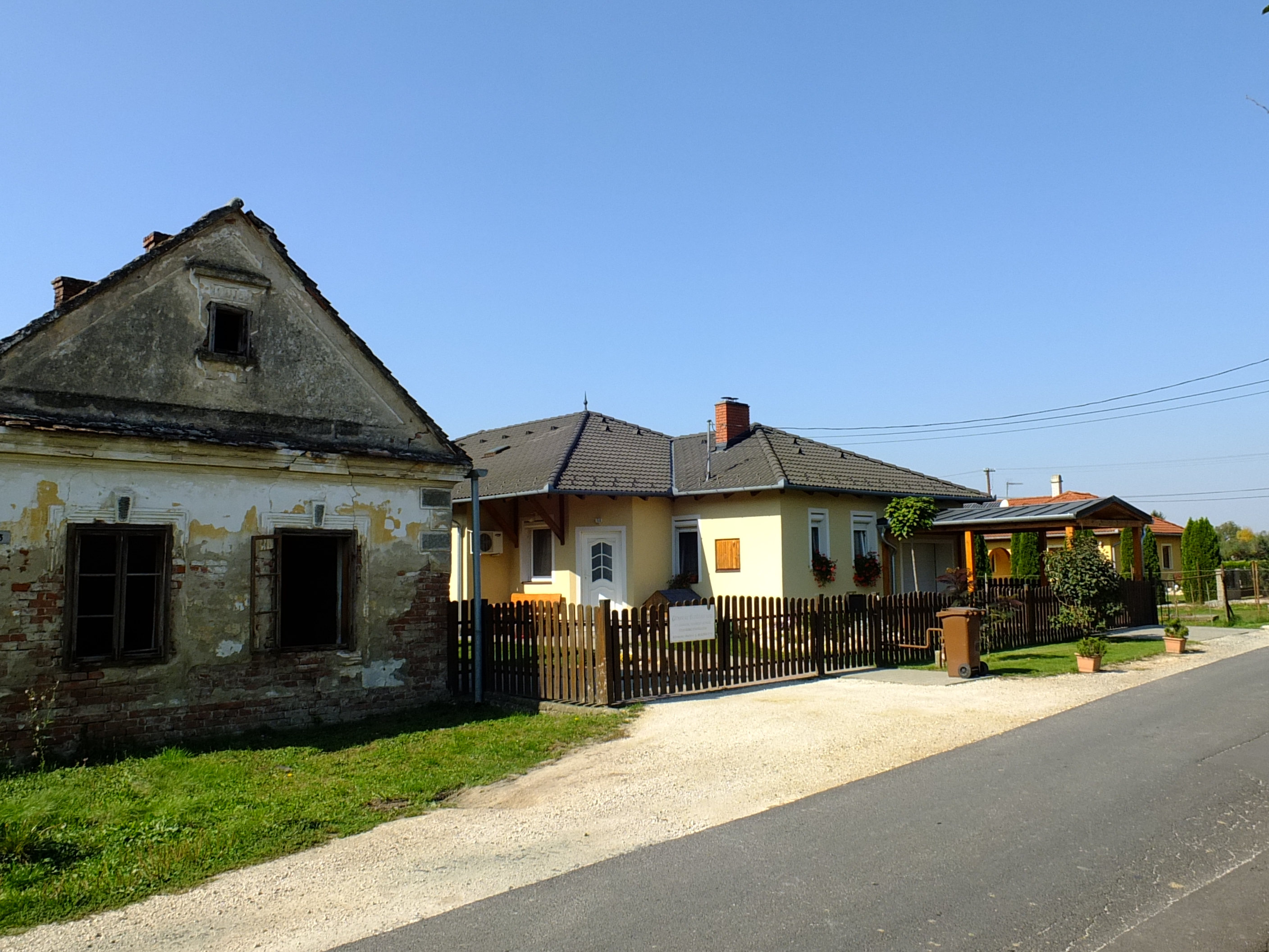 Körmend Vasút utca M8 autópálya miatt bontásra ítélt házai